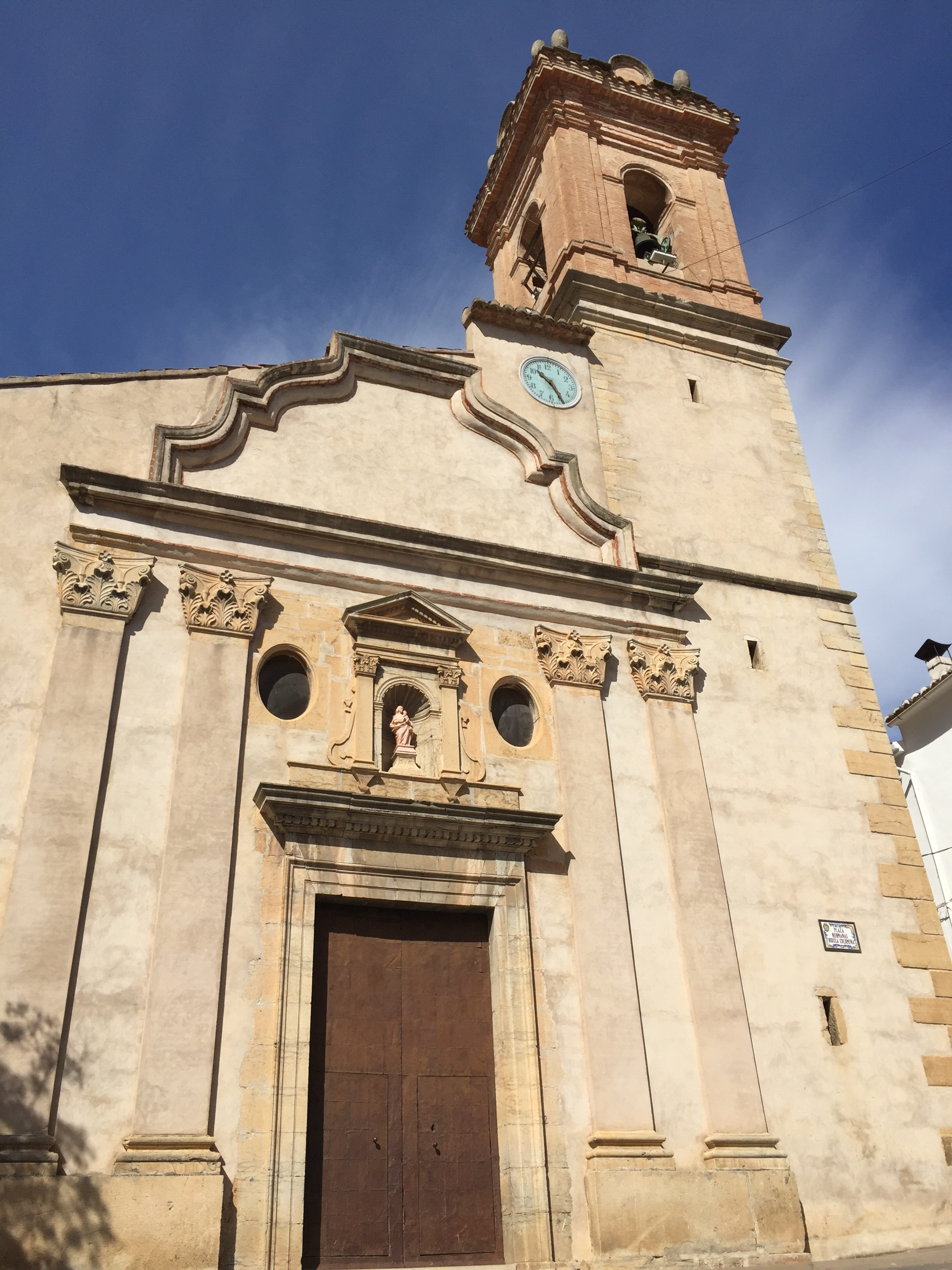 Església Parroquial de Lludient